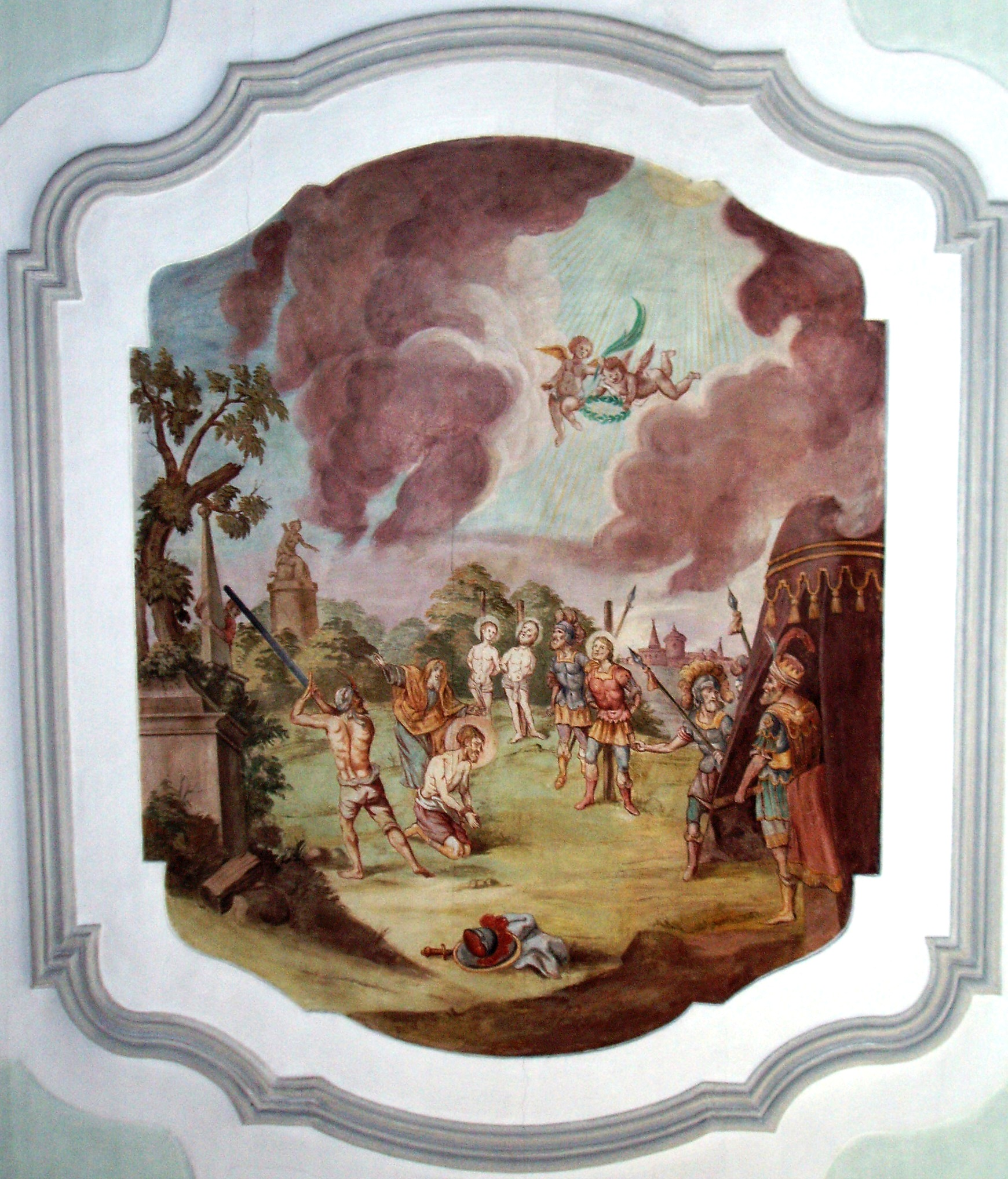 Bergheim, Landkreis Neuburg-Schrobenhausen, Kirche St. Mauritius, Fresko mit dem Martyrium des hl. Mauritius